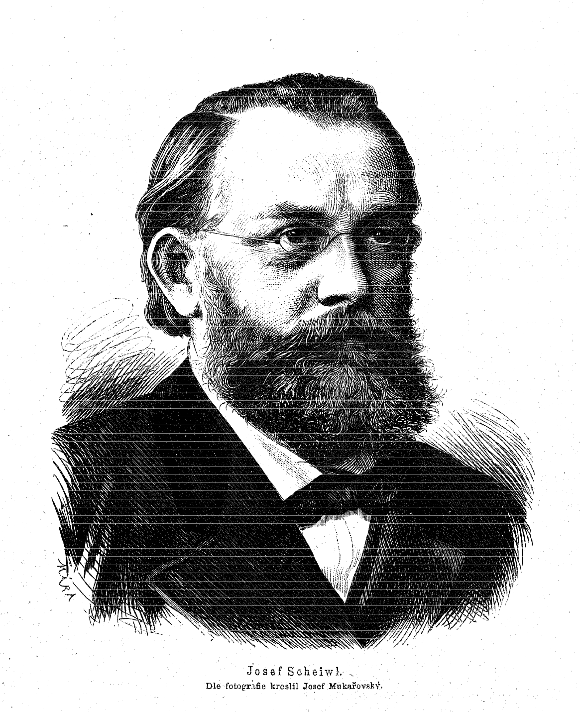 Josef Scheiwl (1833-1912), Czech painter